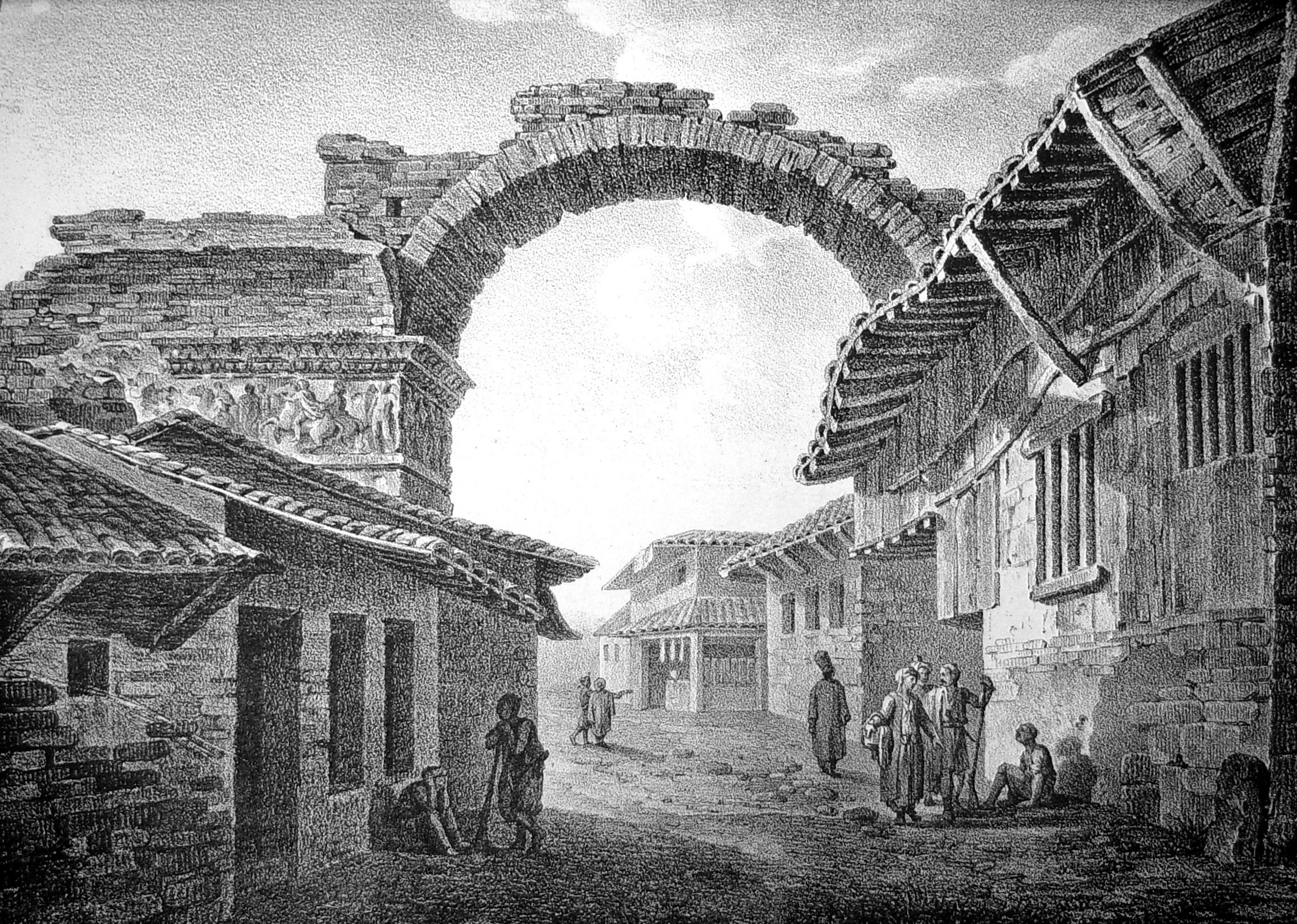 L'arc de Galère à Thessalonique en 1831.